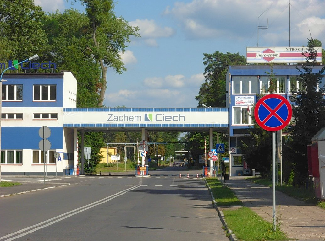 Wjazd na teren Zakładów Chemicznych w Bydgoszczy (Zachem, Nitrochem i inne)